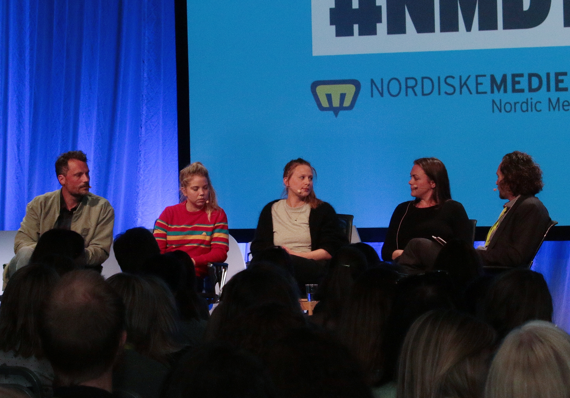 Medvirkende: Siri Seljeseth (Manusforfatter og hovedrolleinnehaver, Unge Lovende) , Alexandra Gjerpen (Skuespiller) , Gine Cornelia Pedersen (Skuespiller og forfatter) & Bård Fjulsrud (Kreativ leder, Monster Scripted) Moderator: Mikal Olsen Lerøen (Reportasjeleder, NRK Hordaland)